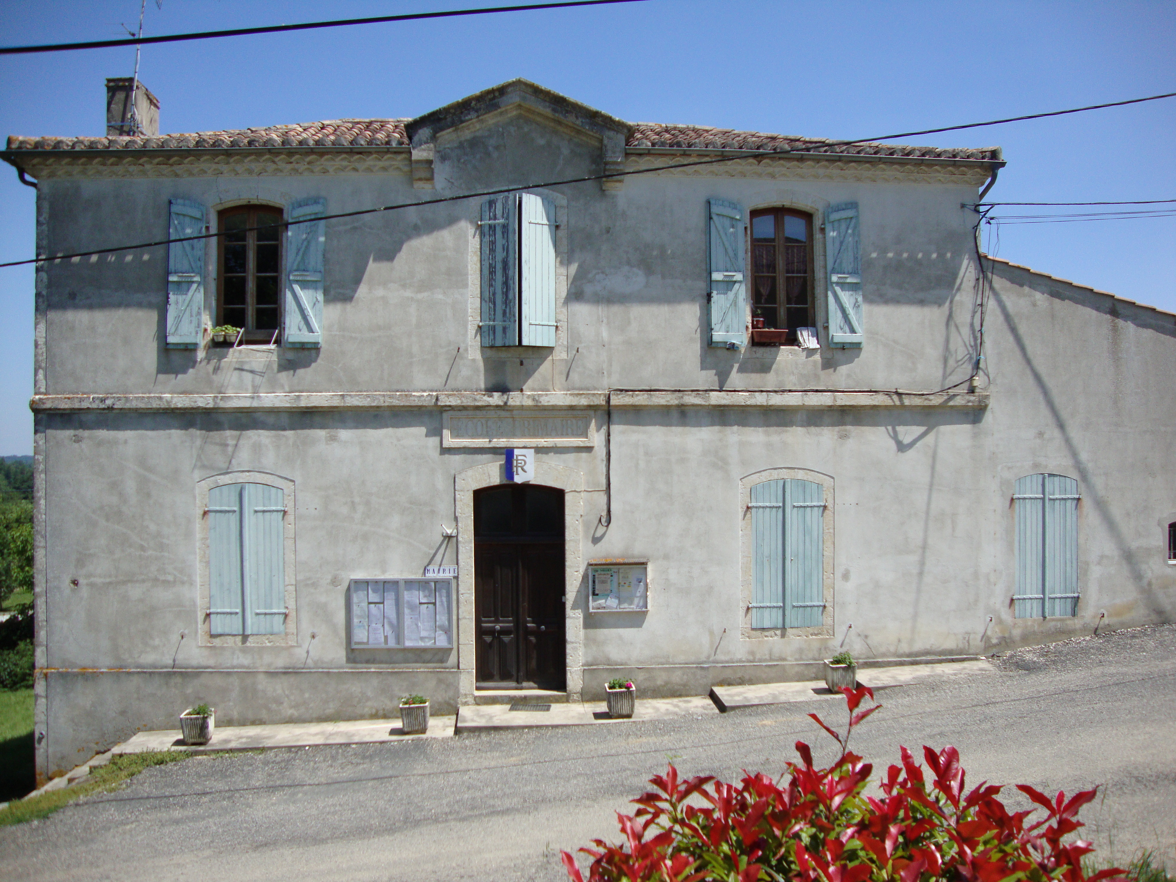 L'Isle-Arné (Gers, Fr) mairie